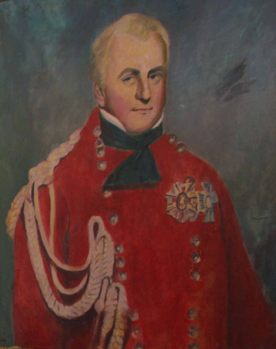 Sir Frederick Adam (1785 - 1853)